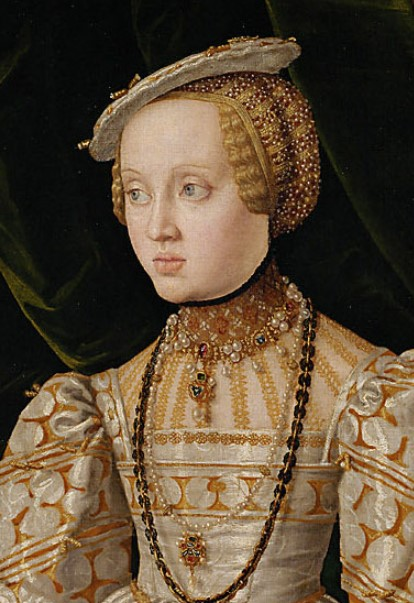 Anna Habsburżanka